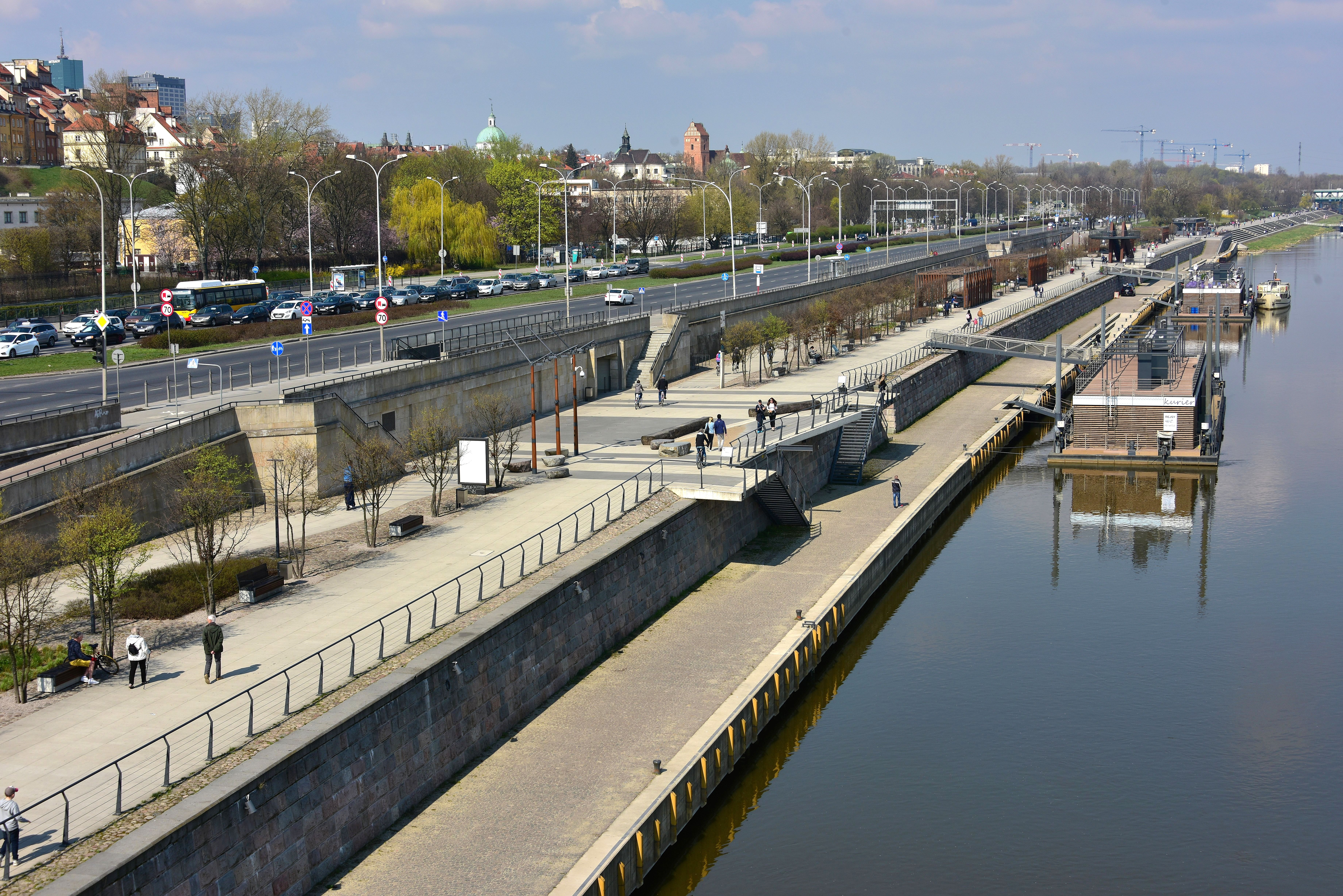 Bulwar wiślany im. Jana Karskiego w Warszawie, widok z mostu Śląsko-Dąbrowskiego w kierunku mostu Gdańskiego